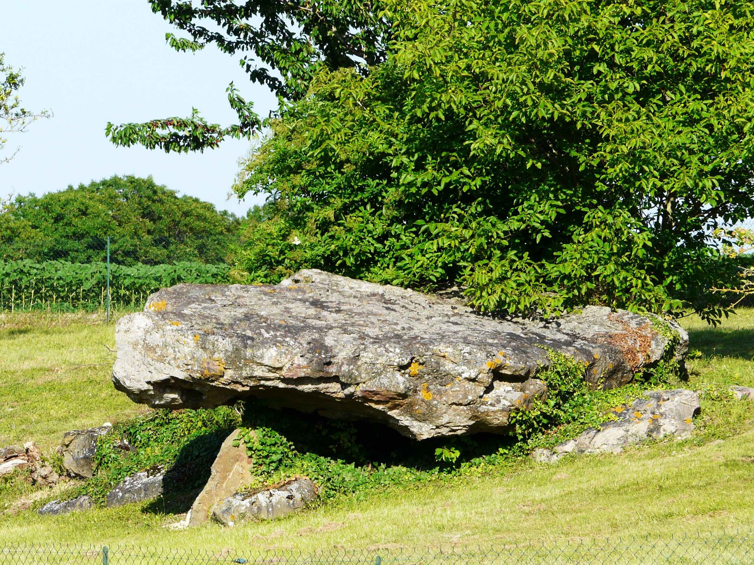 Dolmen de la Fontaine de Son n°2, Saint-Léger-de-Montbrillais, Vienne, France